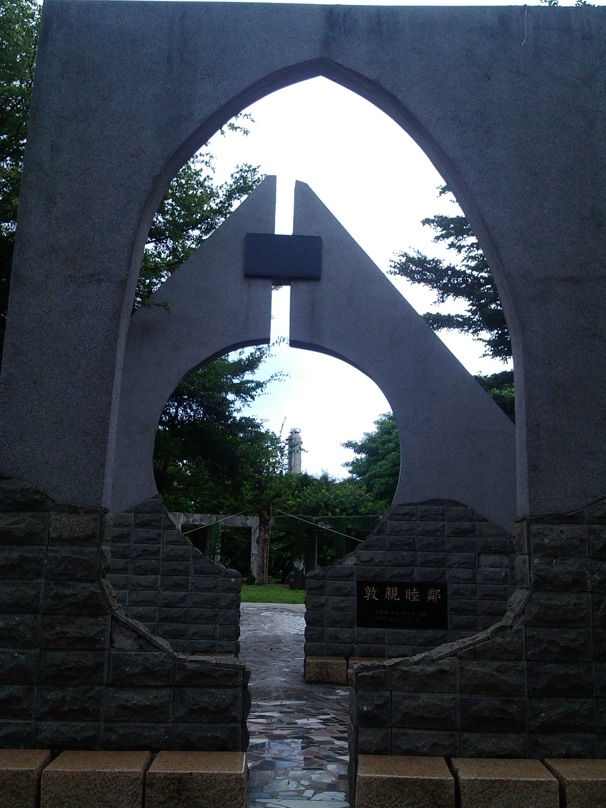 位於台17線上 工業區西側 近市區